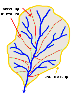 he:אגן ניקוז, תרגום לעברית של האיור המקביל בוויקי האנגלית.